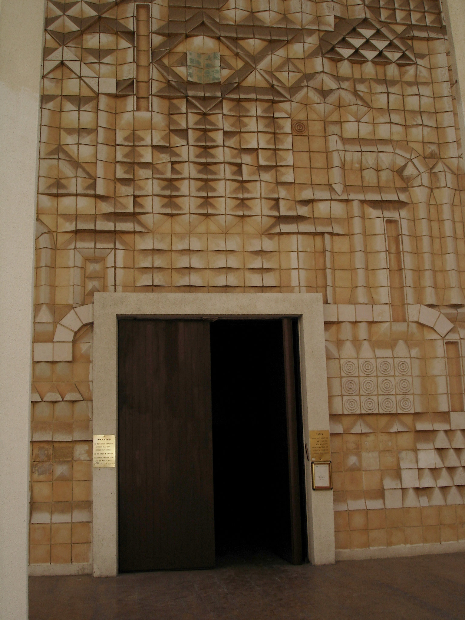 Grande synagogue de Tel Aviv. Entrée principale Great Synagogue of Tel Aviv- Main entrance